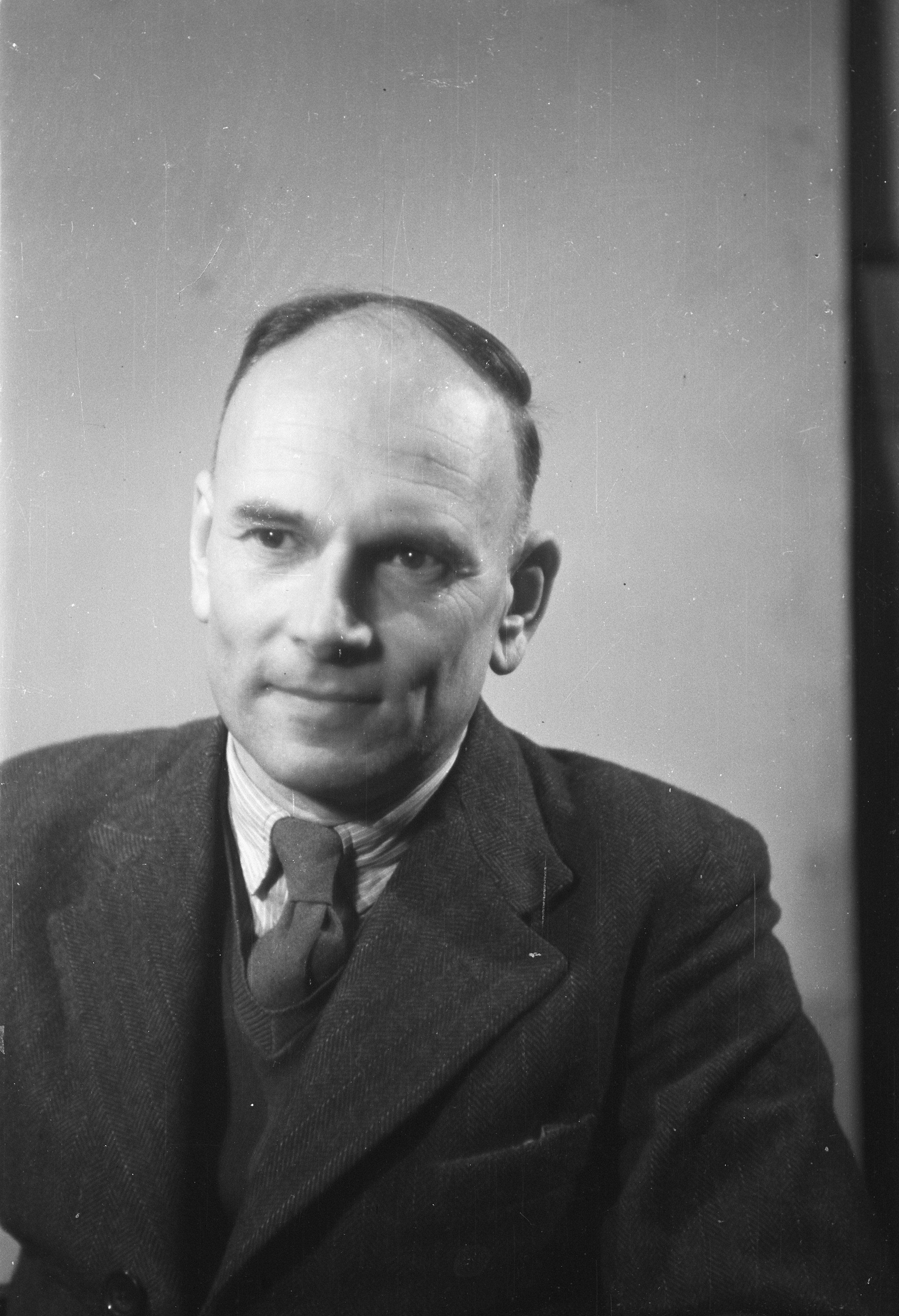 Collectie / Archief : Fotocollectie Anefo Reportage / Serie : [ onbekend ] Beschrijving : Hoofdbestuur PvdA. Jrh. dr. M. van der Goes van Naters, fractievoorzitter van de PvdA Datum : 19 februari 1946 Trefwoorden : bestuursleden, fractievoorzitters, kamerleden, politici, politiek, portretten Persoonsnaam : Goes Van Naters M Van Der Instellingsnaam : PvdA Fotograaf : Breijer, Charles / Anefo Auteursrechthebbende : Nationaal Archief Materiaalsoort : Negatief (zwart/wit) Nummer archiefinventaris : bekijk toegang 2.24.01.05 Bestanddeelnummer : 901-4783